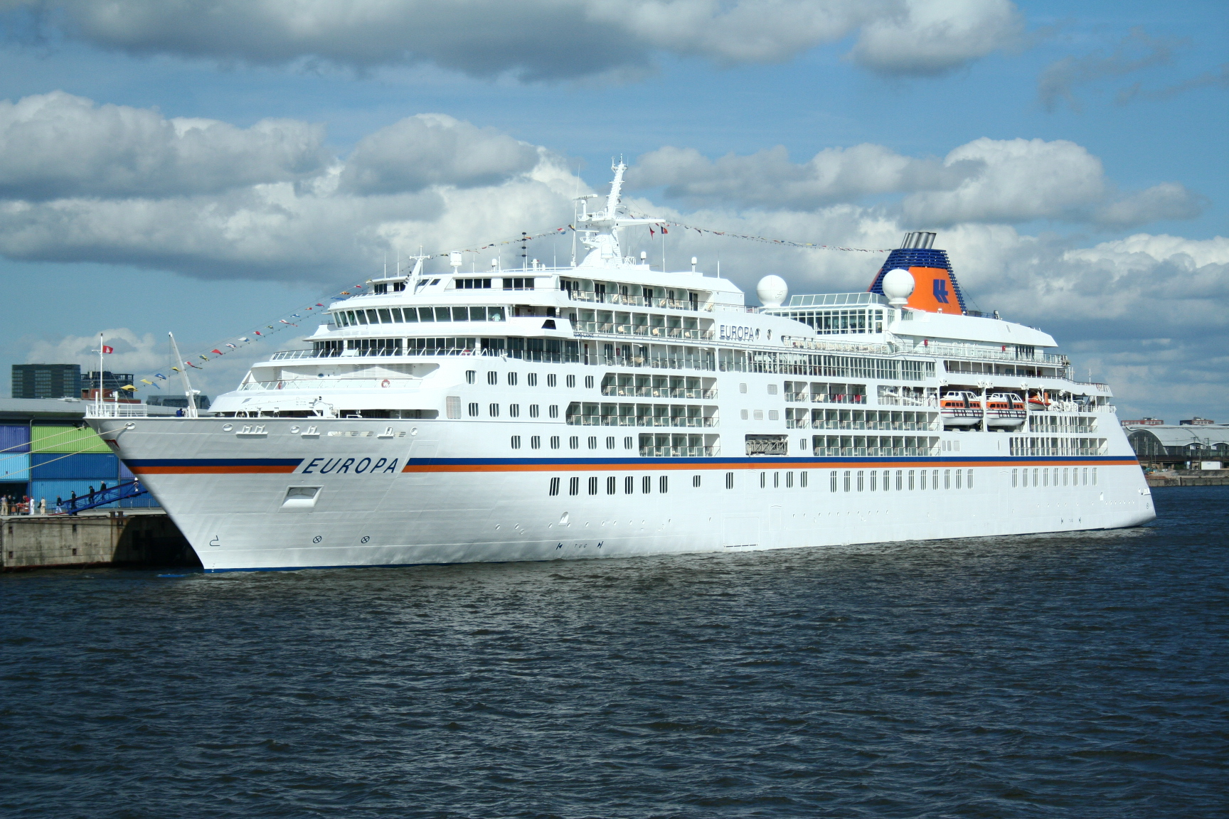 Europa im Hamburger Hafen